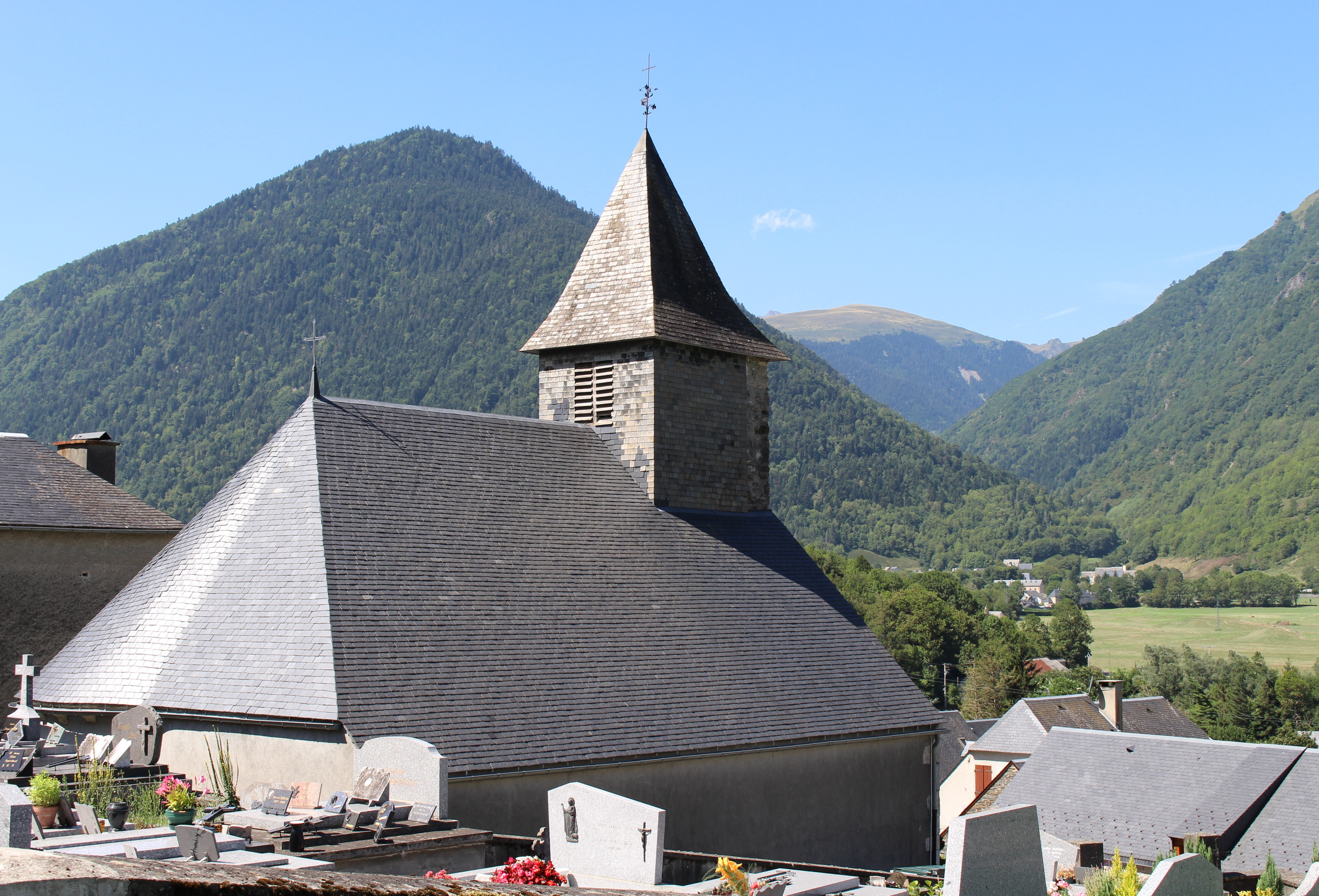 Église Saint-Just et Saint-Pasteur de Grézian (Hautes-Pyrénées)